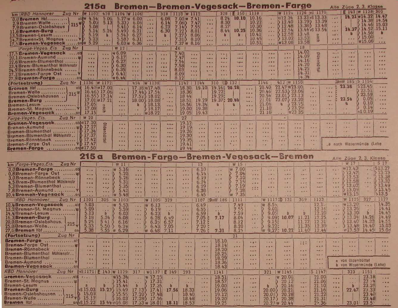 Fahrplan der Farge-Vegesacker Eisenbahn